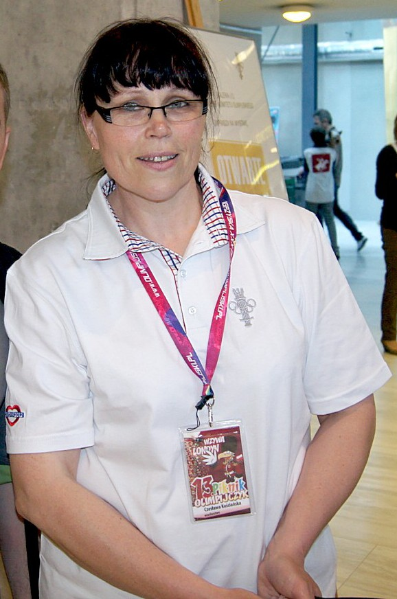 Czesława Kościańska, polish Rower.